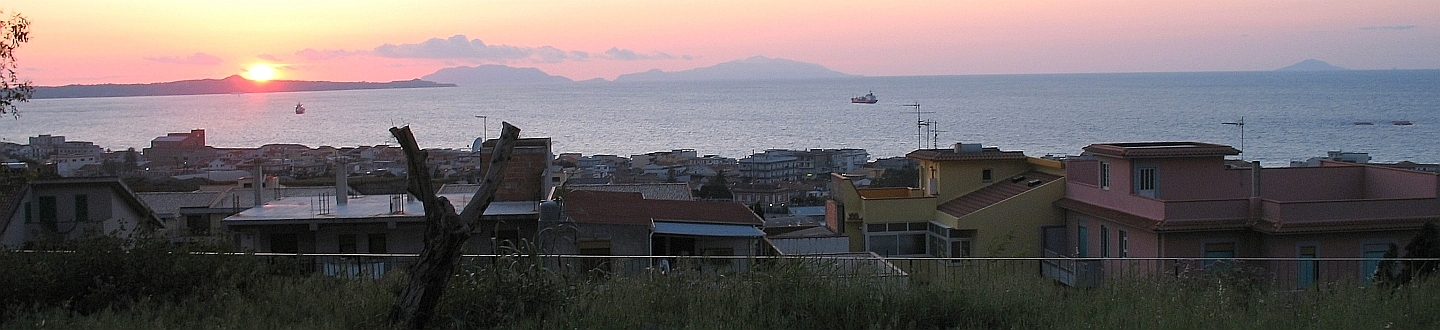 Venetico Marina: tramonto sul Mar Tirreno